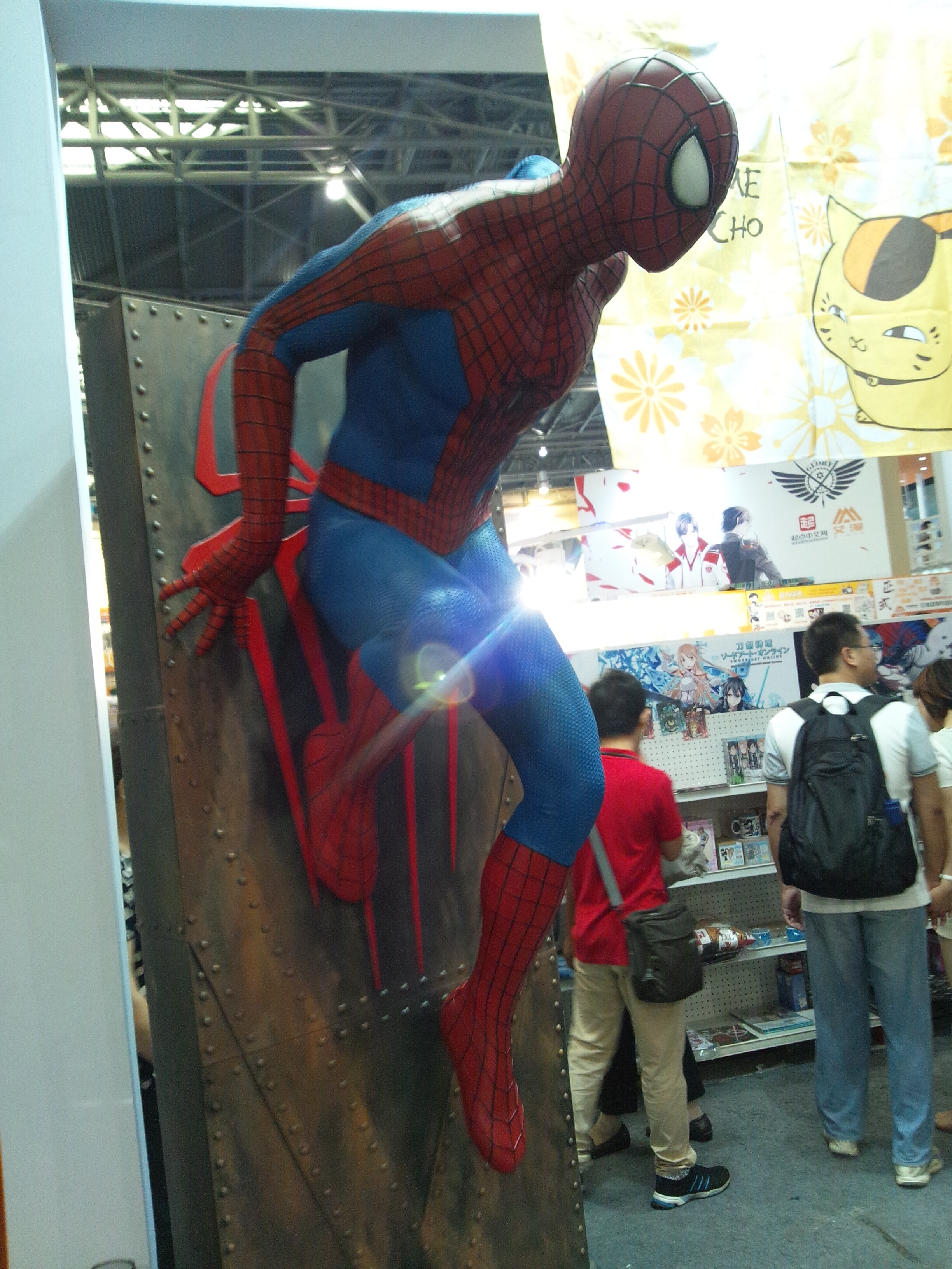 CCG 2014上展出的蜘蛛侠人偶模型。